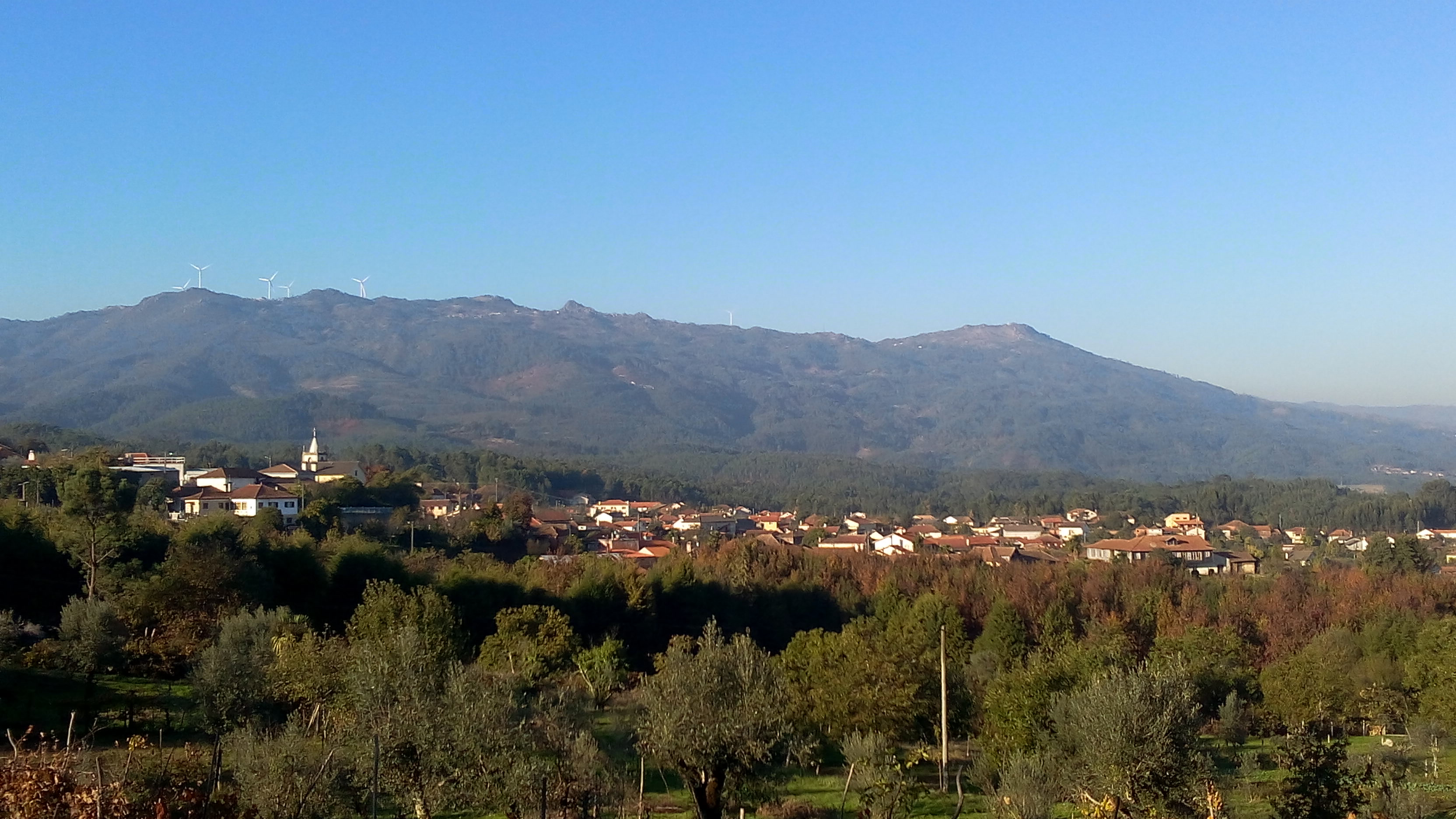 Parte (central) do Tourigo, com a Serra do Caramulo no fundo.